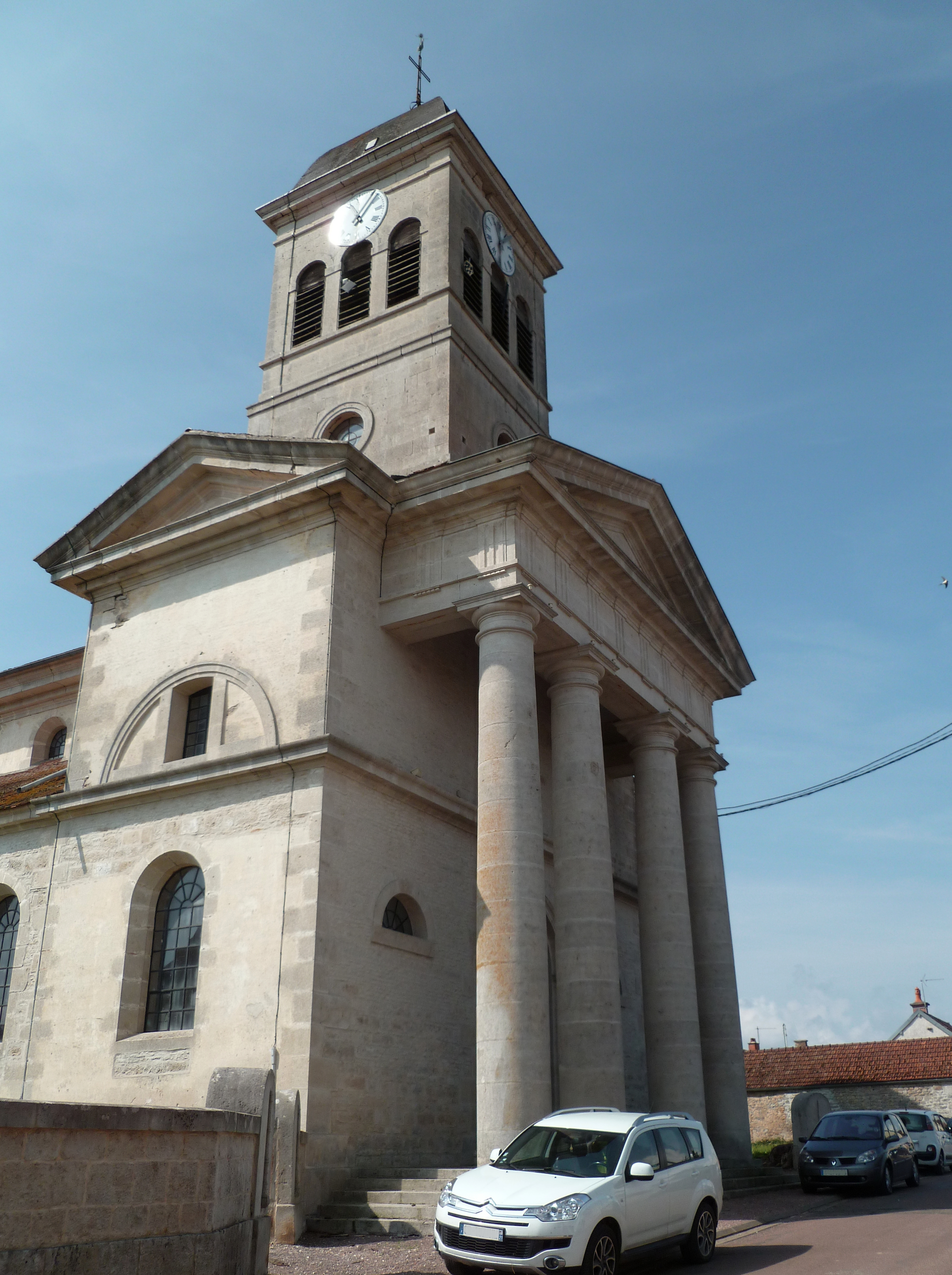 Ampilly-le-Sec (Côte-d'Or, France) église du village.